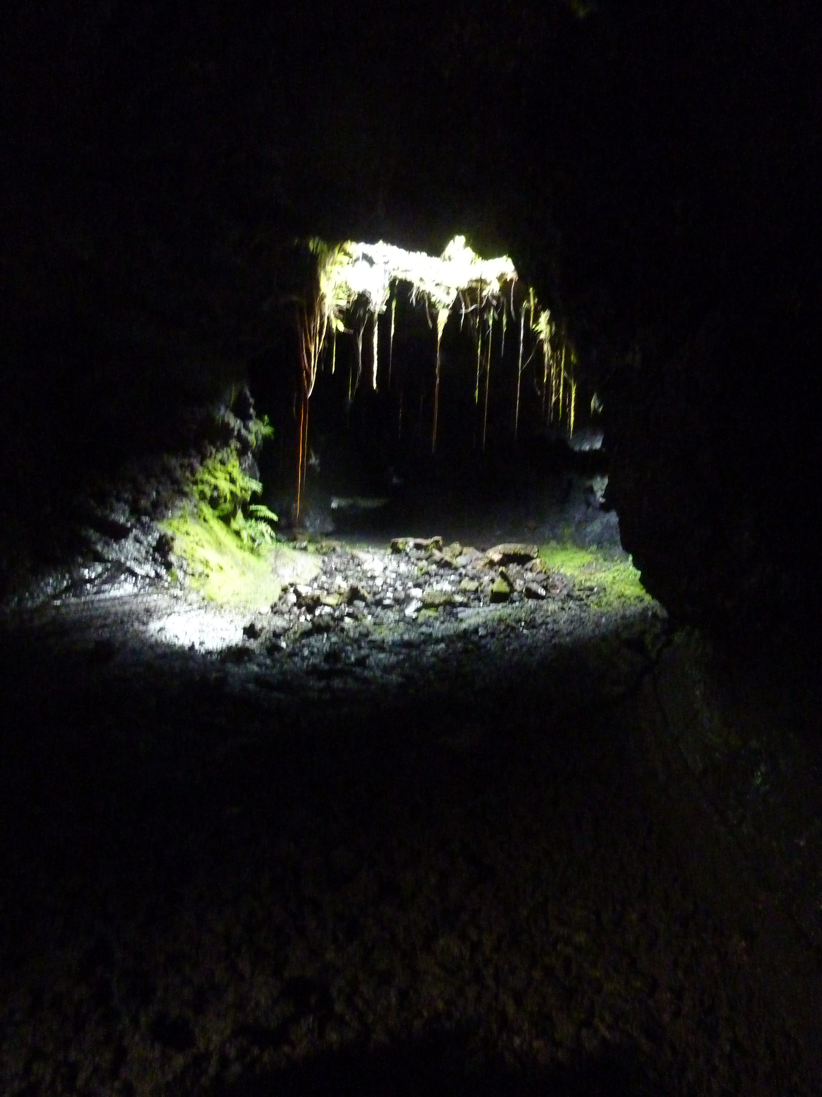 Rando volcan tunnel de lave réunion